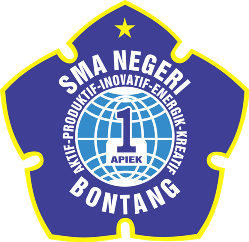 Logo SMA Negeri 1 Bontang